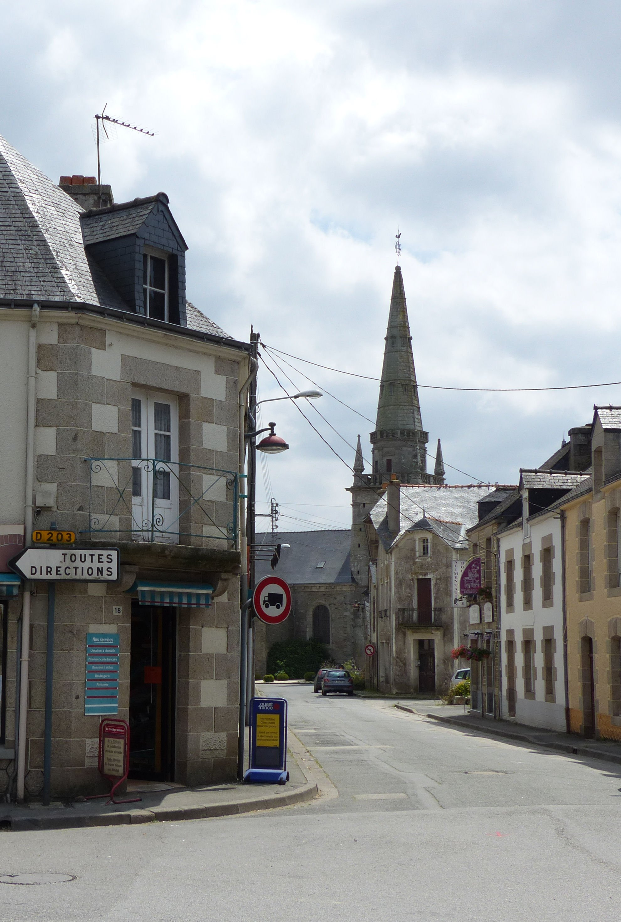 Commune de Naizin, le Bourg, Grand-Rue.